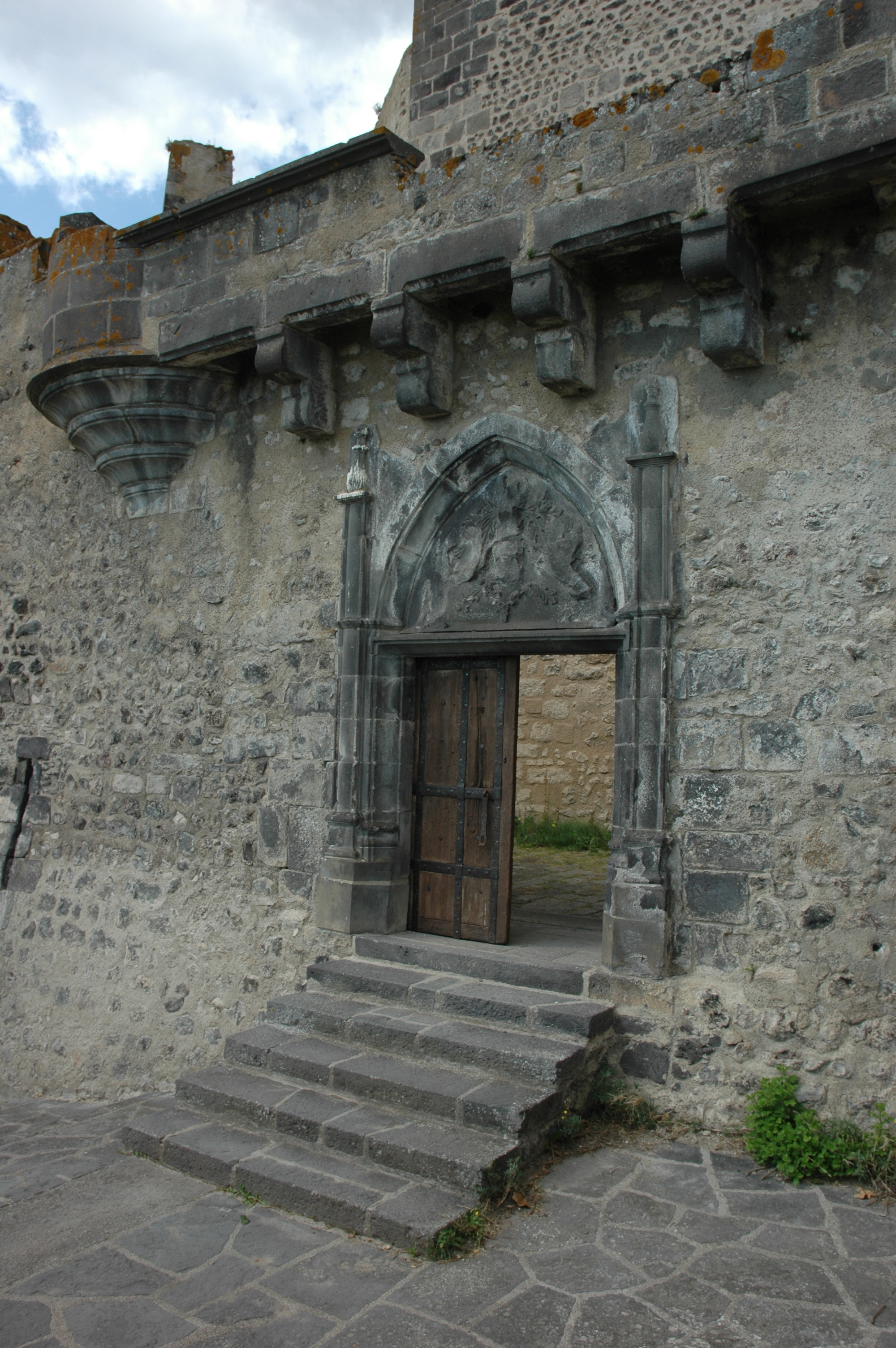 Château de Tournoël